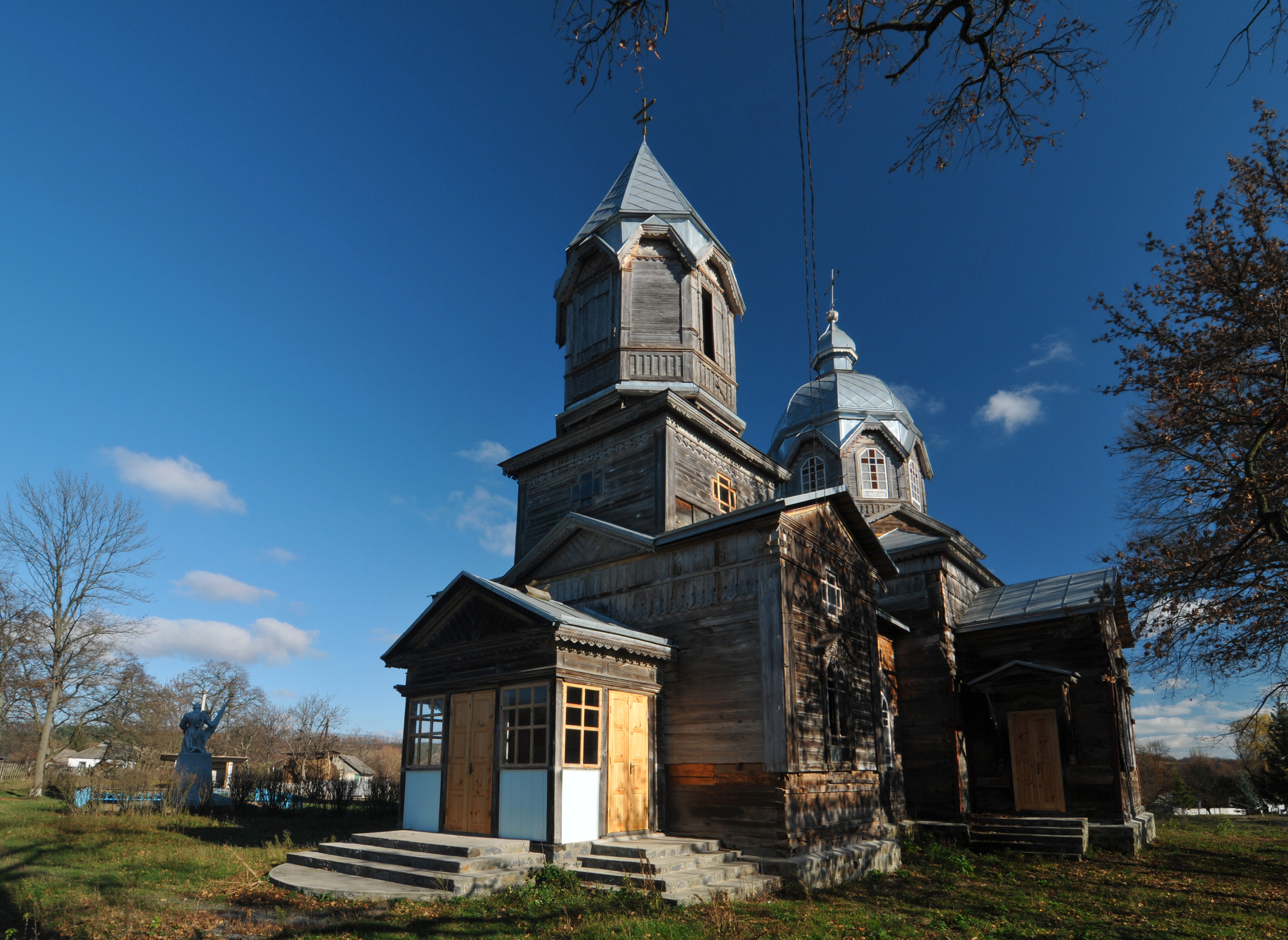 Мизинівка, Георгіївська церква